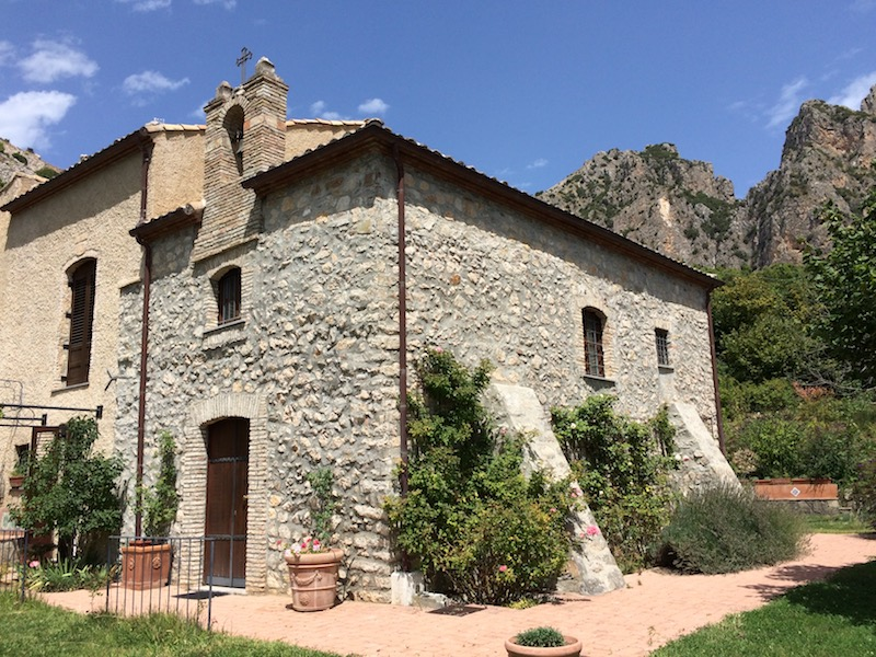 L'abazia di S.Croce dopo i lavori di restauro eseguiti nel 2009